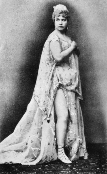 Marie Geistinger als Schöne Helena, bei der Wiener Erstaufführung der Offenbach-Operette am 17. März 1865 im Theater an der Wien.